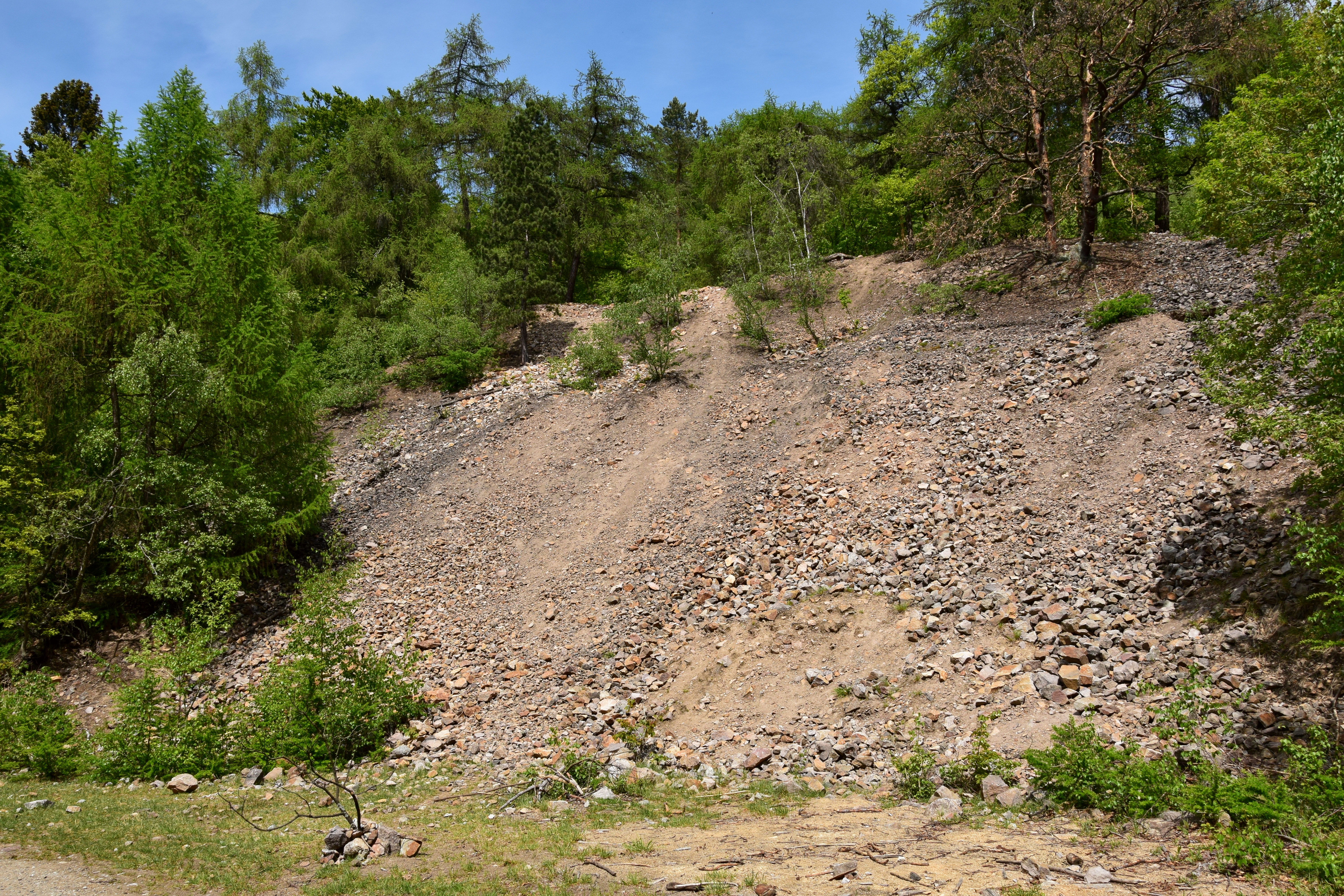 Halda Zwickenpinge (původně snad Zwitterpinge)